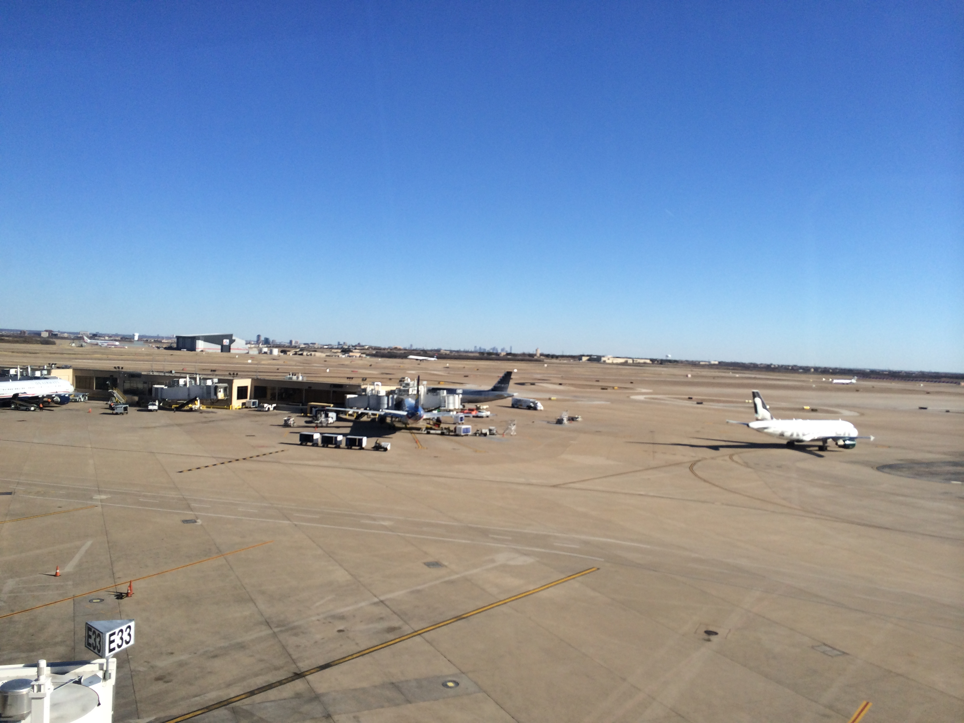 Terminal E del aeropuerto de DFW.